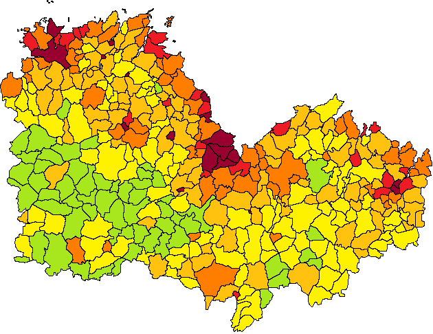 carte de densité de population en 2007 des communes du département des Côtes-d'Armor (d'après les chiffres de l'INSSE)